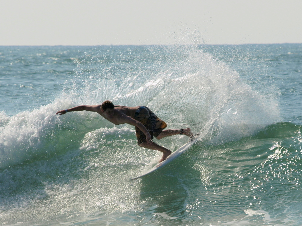 Quicksilver Pro France 2008, Hossegor, France